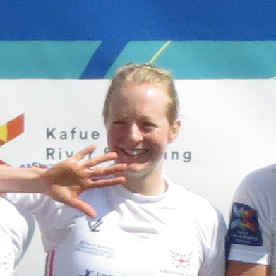 Podium LW4x GER : THOMA, Katrin PIEPER, Leonie MUELLER, Lena NOSKE, Anja GBR STUBBS, Brianna WALCZAK, Ruth CRAIG, Emily PIGGOTT, Eleanor NED SCHONK, Anne Marie KRAAIJKAMP, Mirte WOERNER, Elisabeth FRENKEN, Marie-Anne